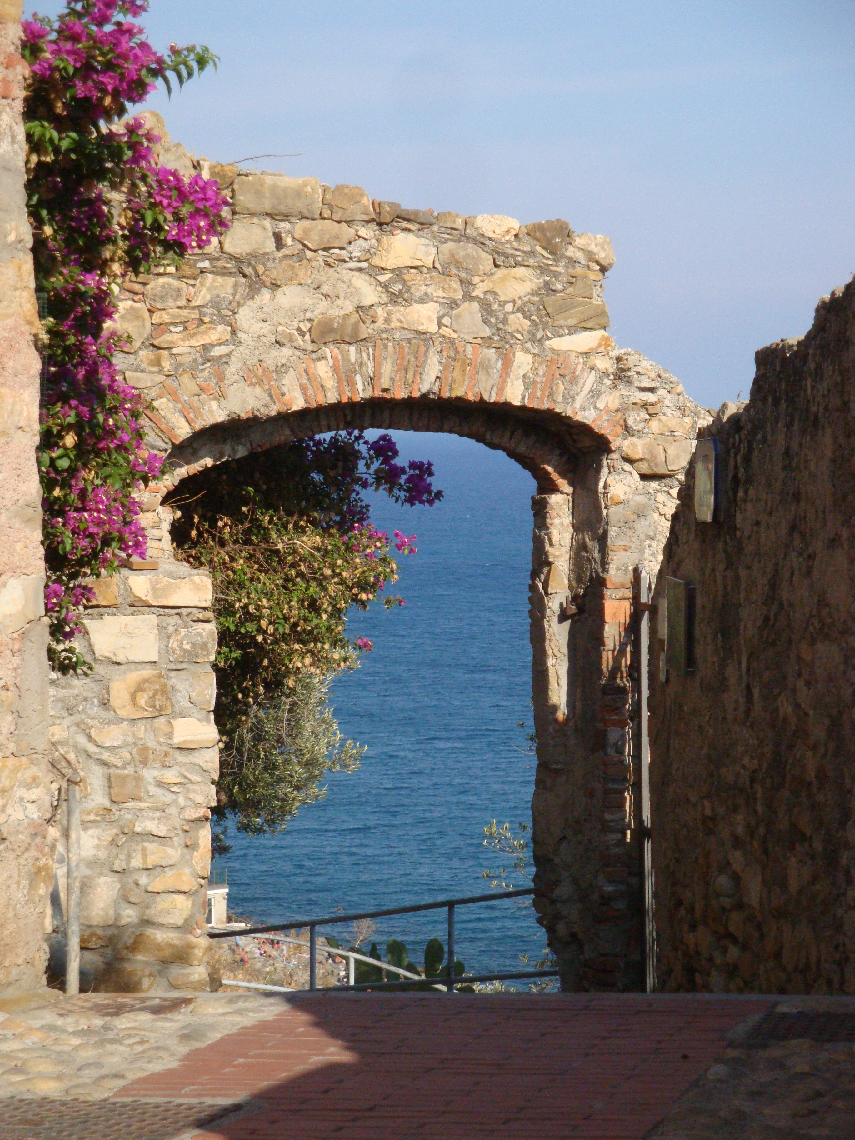 Cervo Autore: Tony Frisina - Alessandria